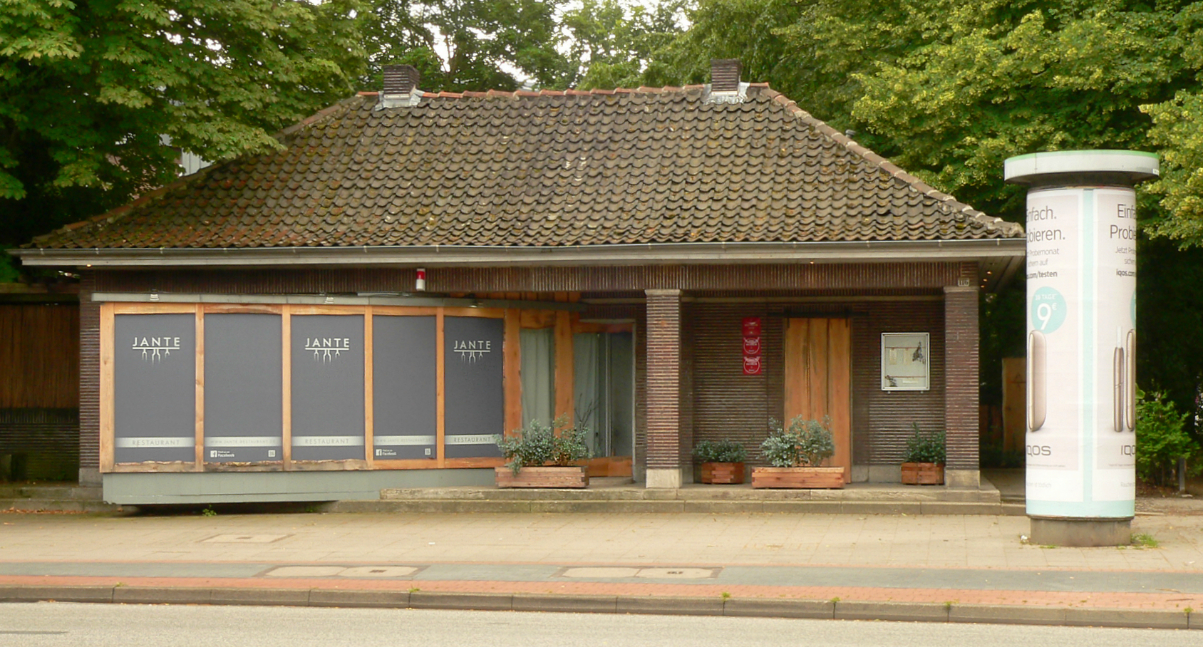 Restaurant „Jante“, vorher ehemaliges WC